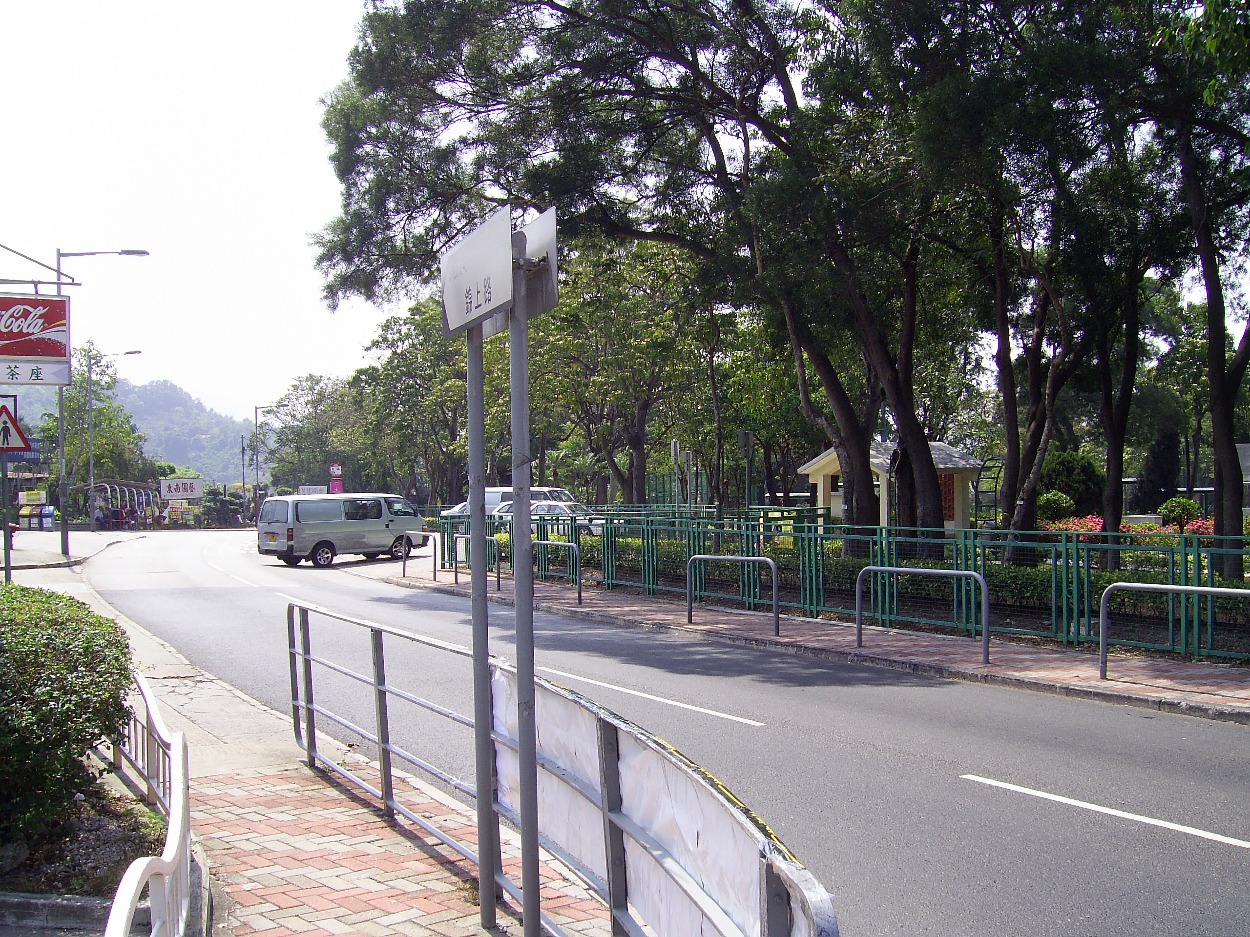 中文（香港）: 錦上路東端起點